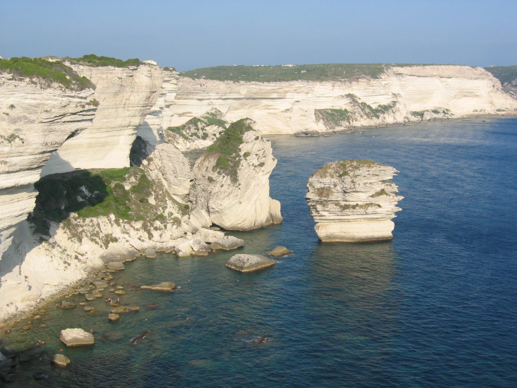 Bonifacio (Corse-du-Sud, France)